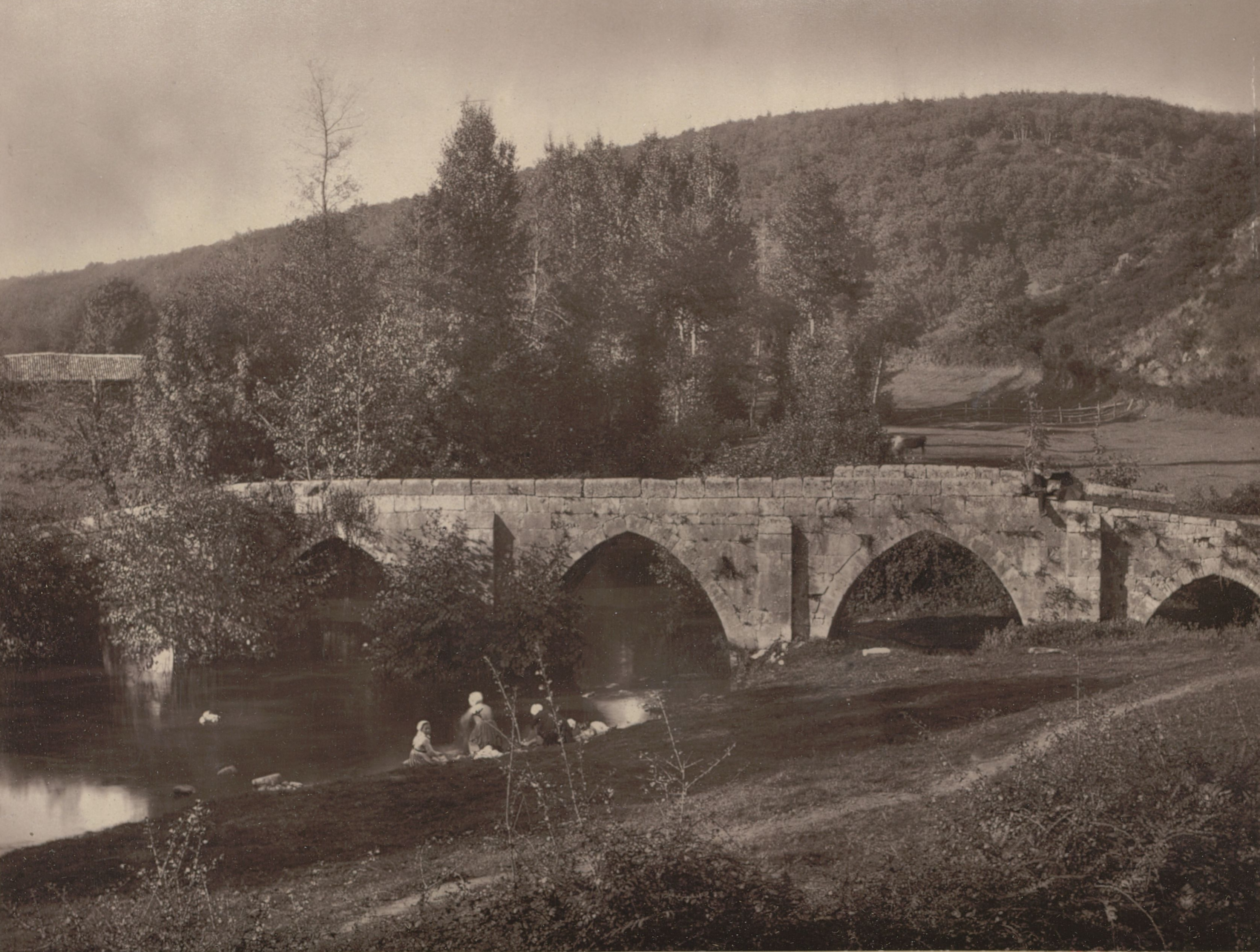 Le pont des Ouillères situés à Mervent, photographié par Jules Robuchon.